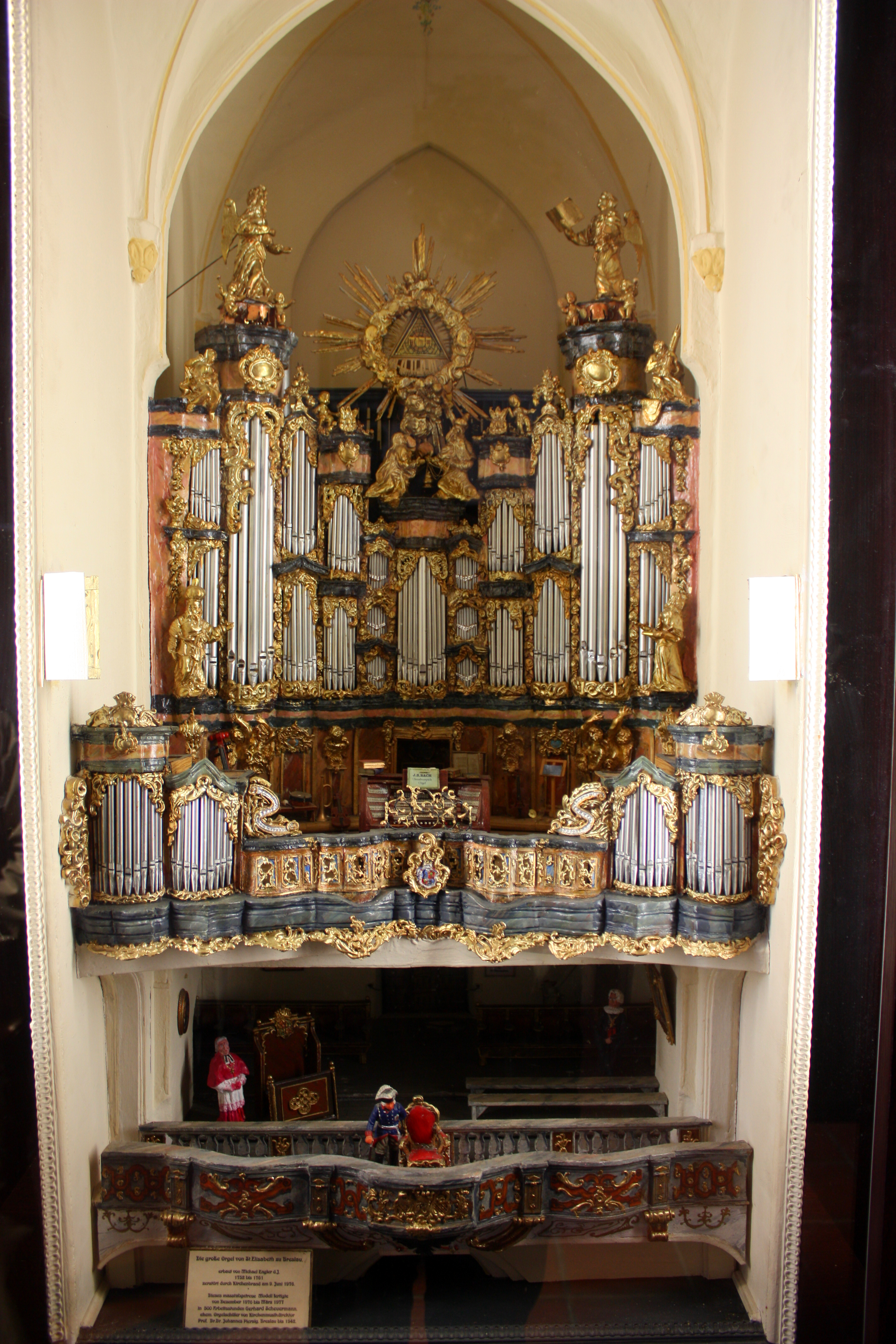 Wrocław, kościół par., ob. garnizonowy p.w. św. Elżbiety, 1 ćw. XIV, 1486